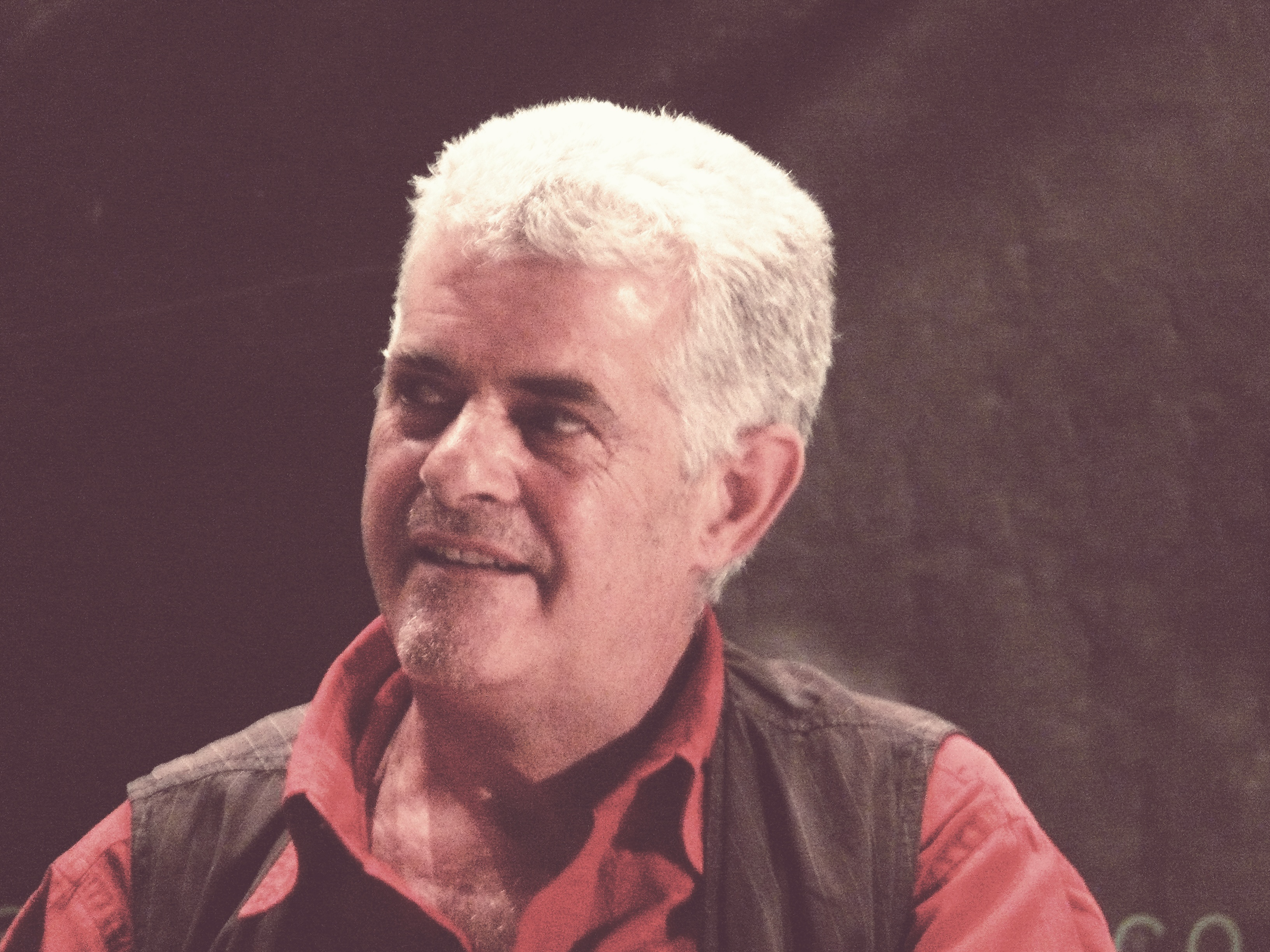 L'actor castellonenc Guillermo Montesinos